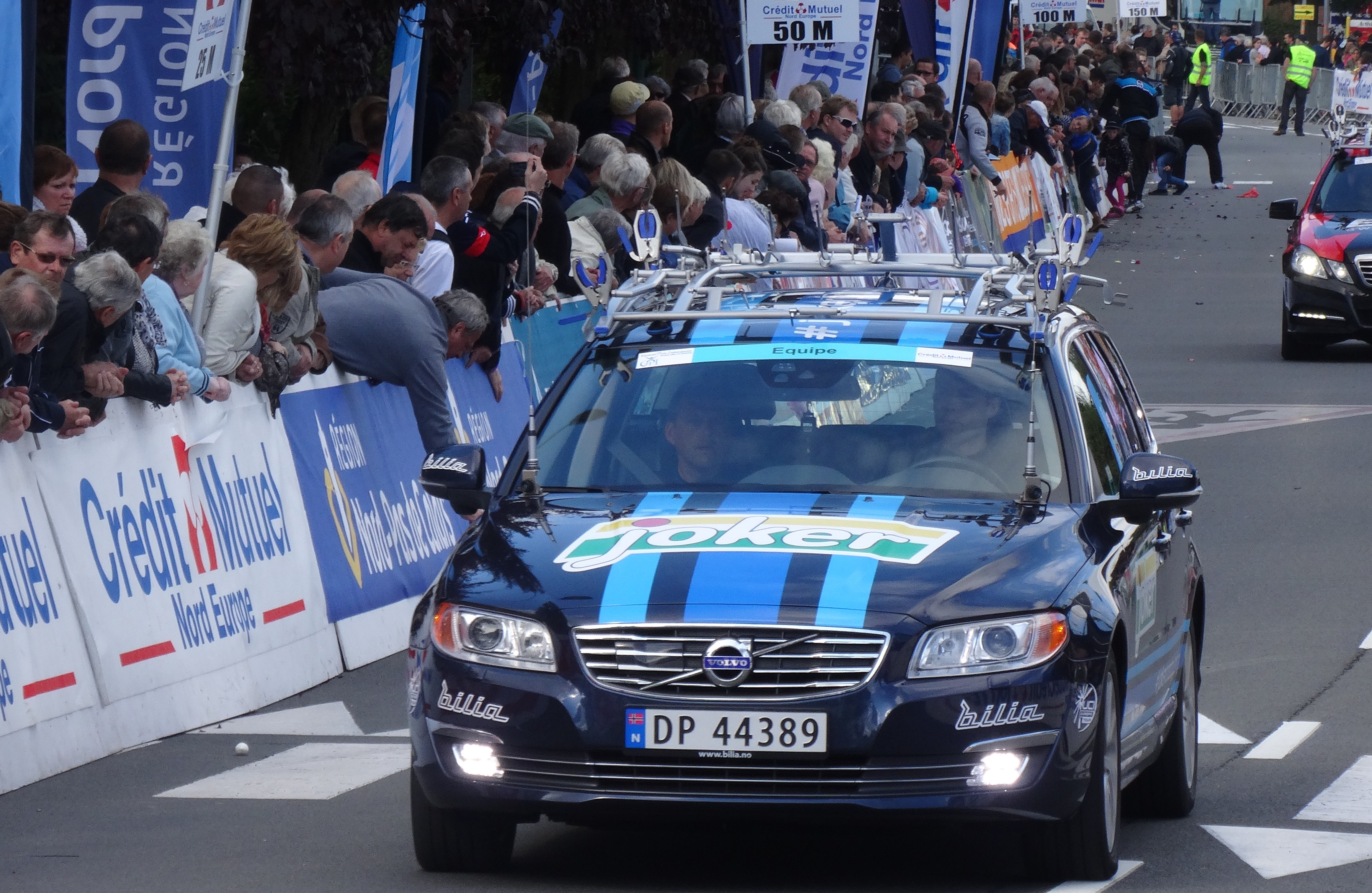 Reportage réalisé le dimanche 21 septembre à l'occasion du départ et de l'arrivée du Grand Prix d'Isbergues 2014 à Isbergues, Nord-Pas-de-Calais, France.